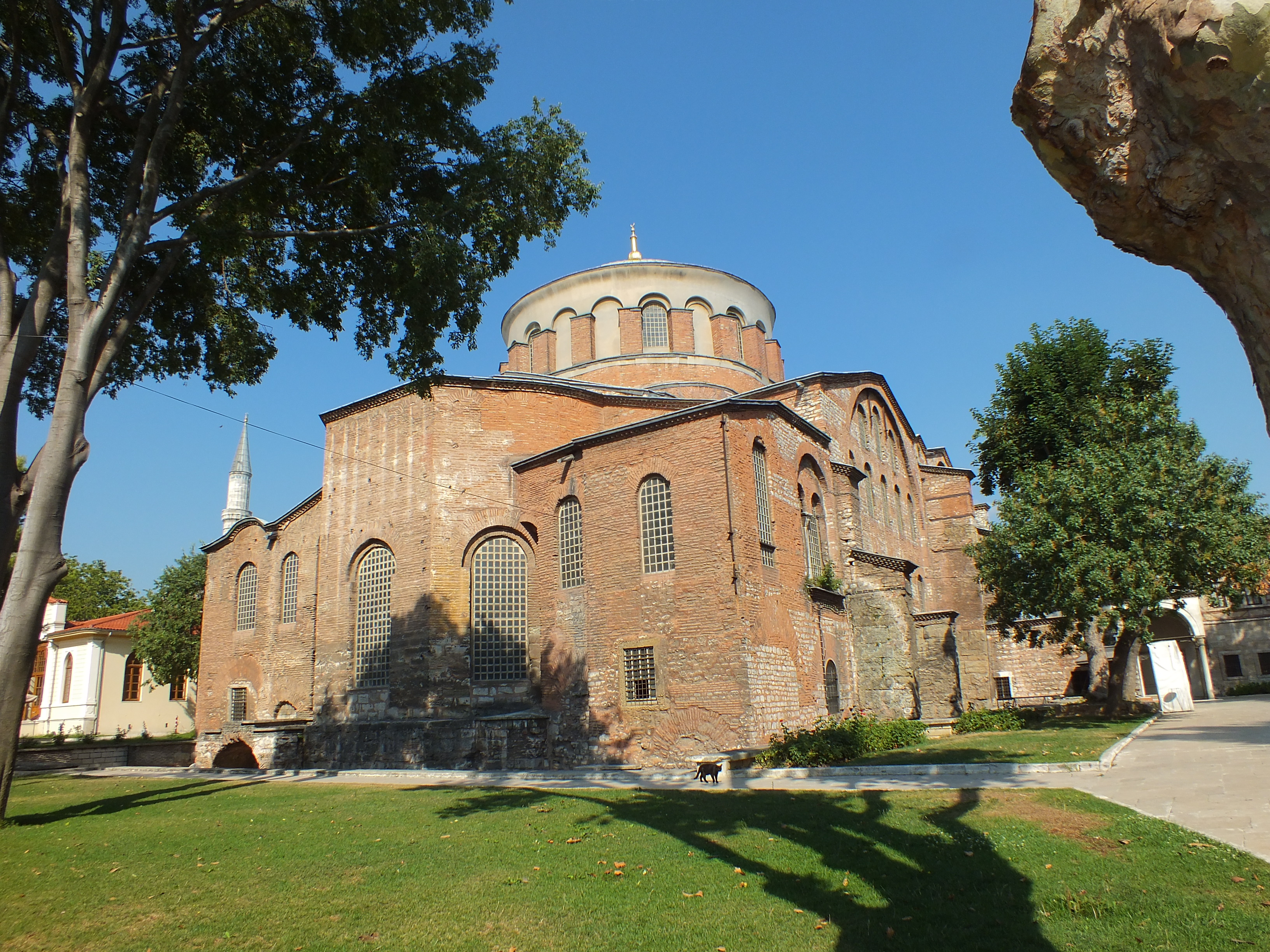 Se erige bajo la advocación de la Santa Paz. Siglo VI